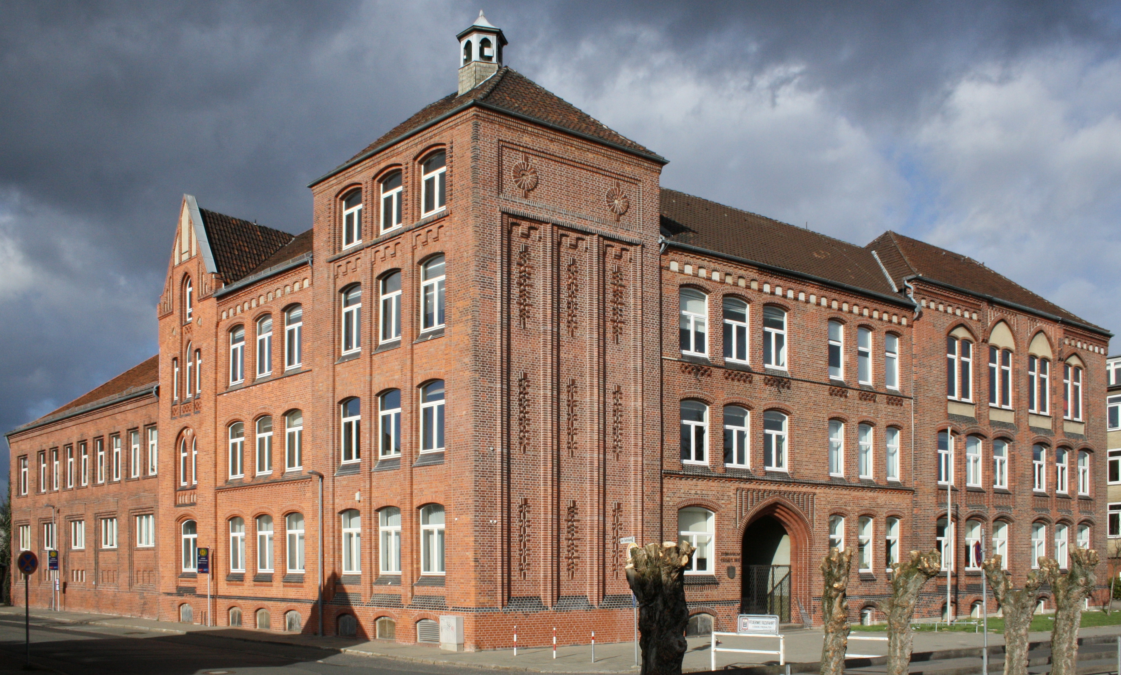 Lehrte, Friedrichstraße 10a: Gymnasium Sek I